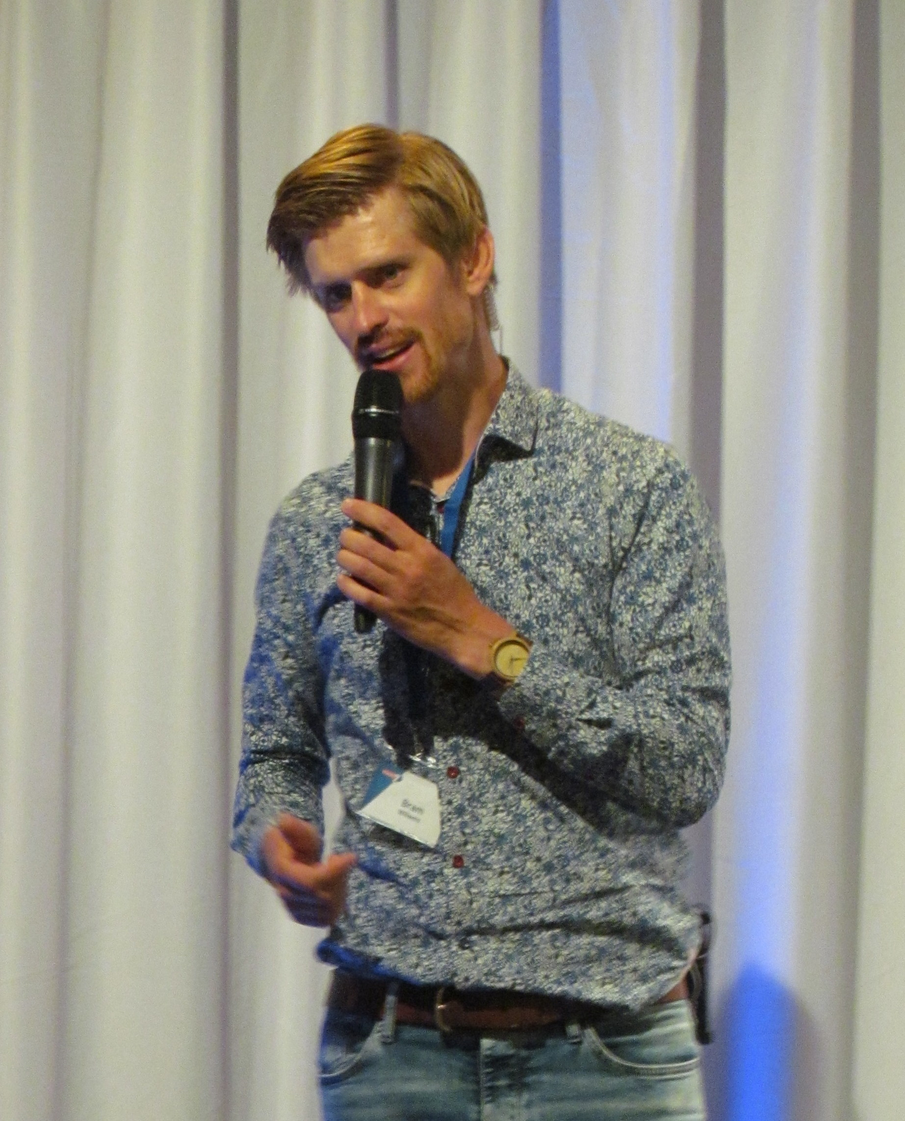 Bram Willems, presentator van de Nederlandse televisiezender Family7